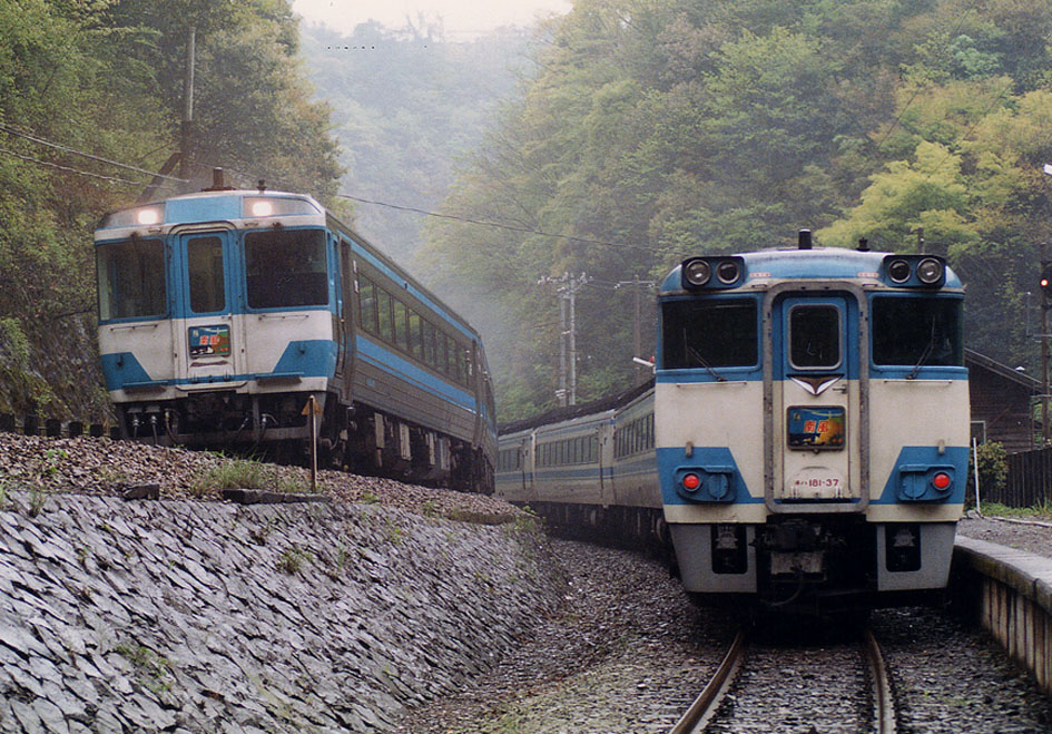 JR四国キハ181系気動車「南風5号」とJR四国キハ185系気動車「南風52号」